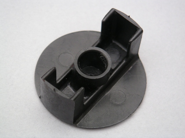 Description : Pièce plastique moulée par injection, 13 octobre 2004 Source : Jean-Jacques MILAN Licence : GFDL Jean-Jacques MILAN